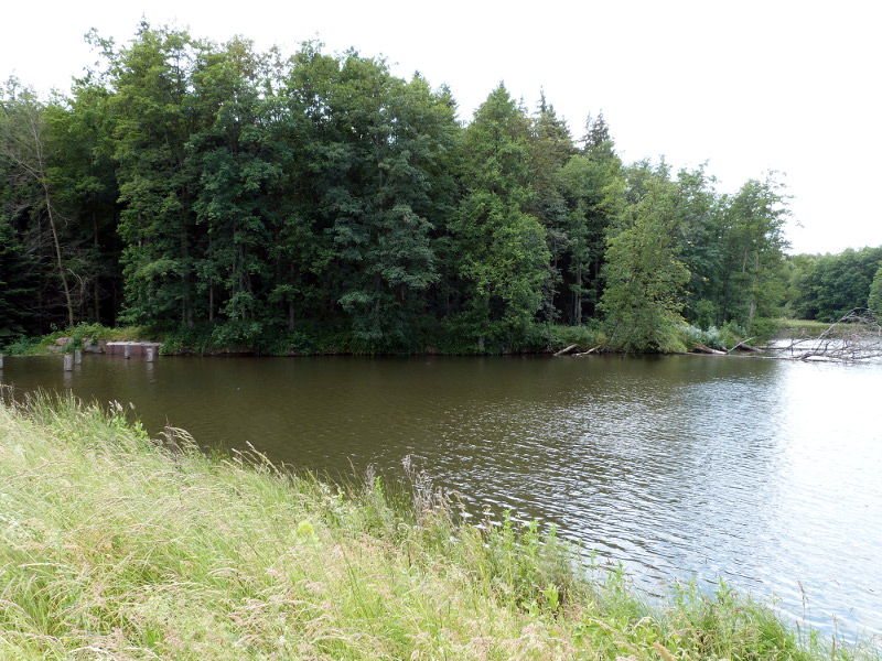 (LSG:BW-1.36.044)_Frankenbachtal, Sägweiher